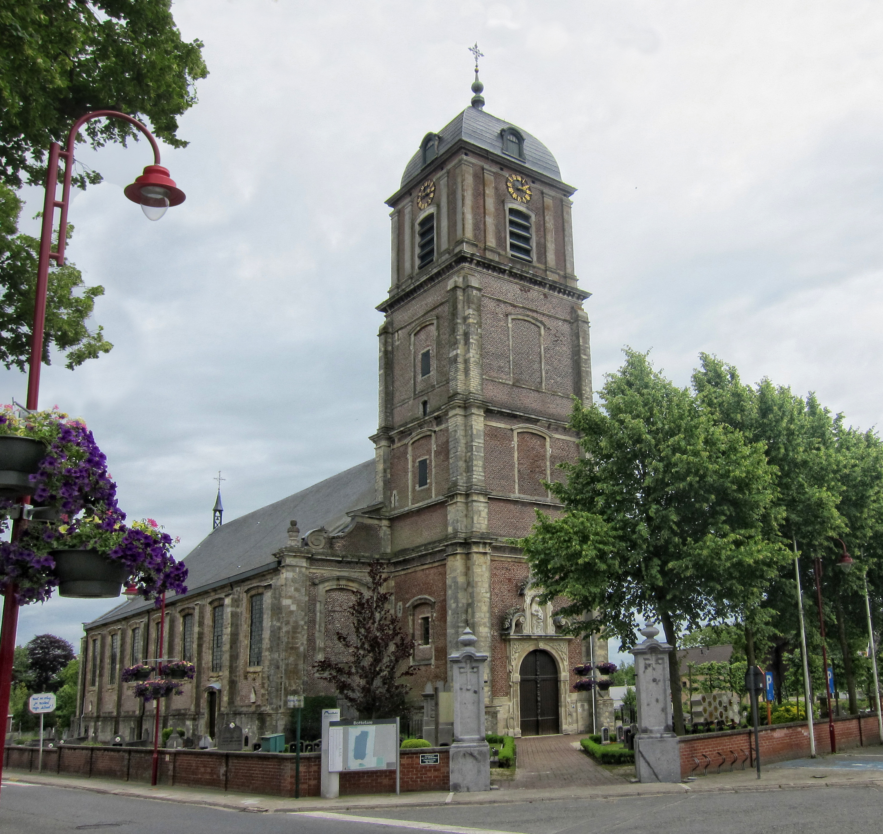 De Sint-Annakerk te Bottelare, België